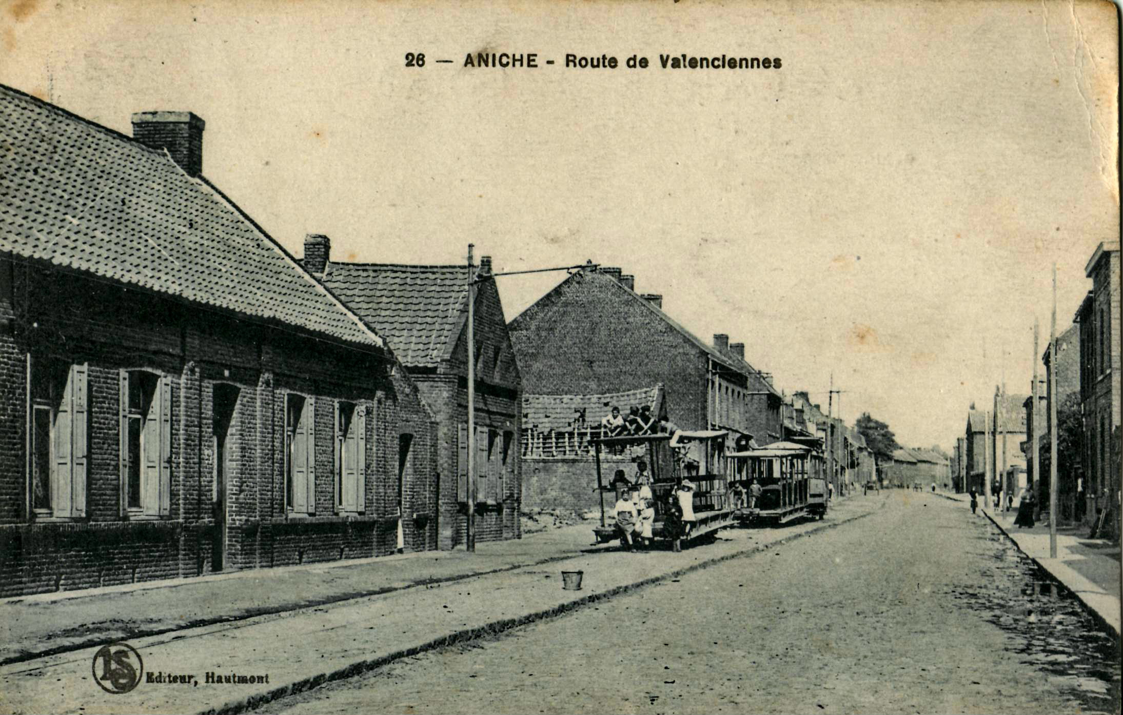 Carte postale ancienne éditée par LS à Hautmont, n°26 : ANICHE - Route de Valenciennes